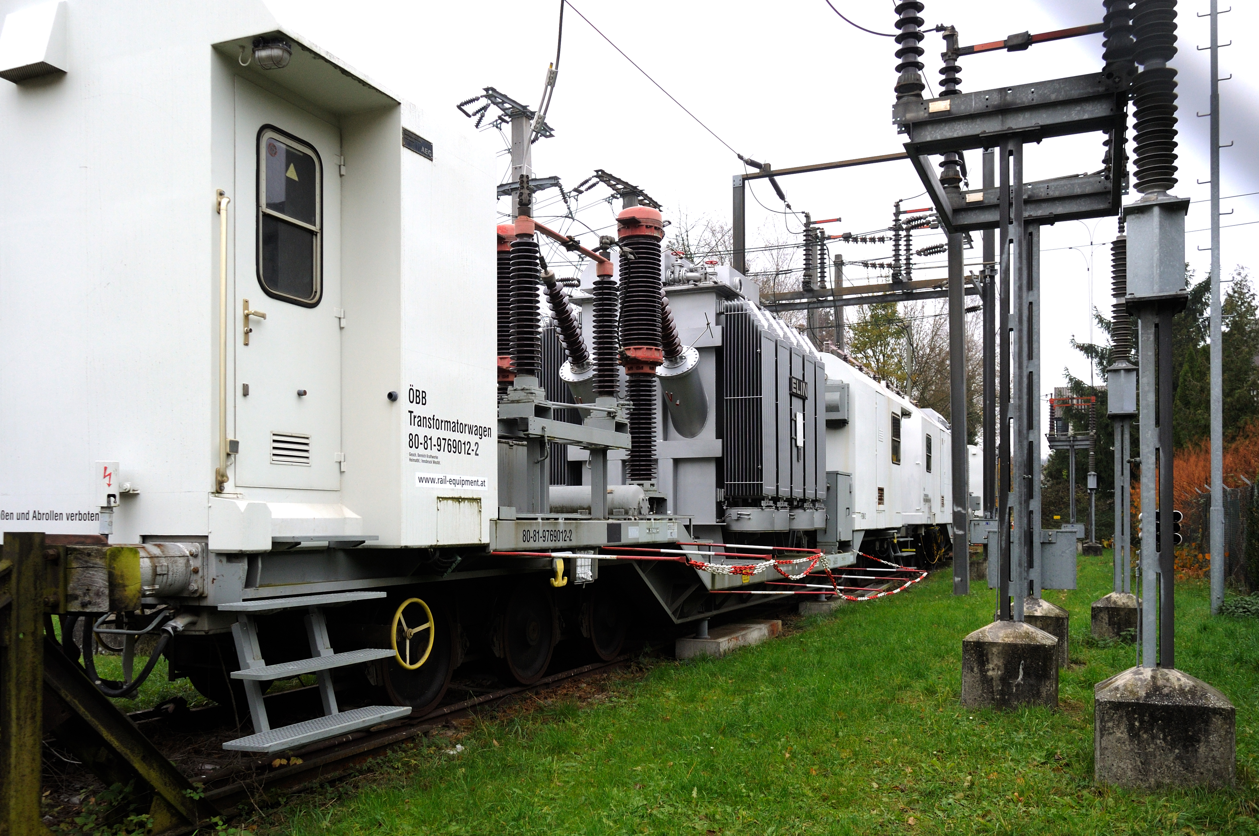 Transformatorwagen 80 81 9769 012-2 (Fahrbares Unterwerk FUW 2) beim Unterwerk des Bhf. Rekawinkel.